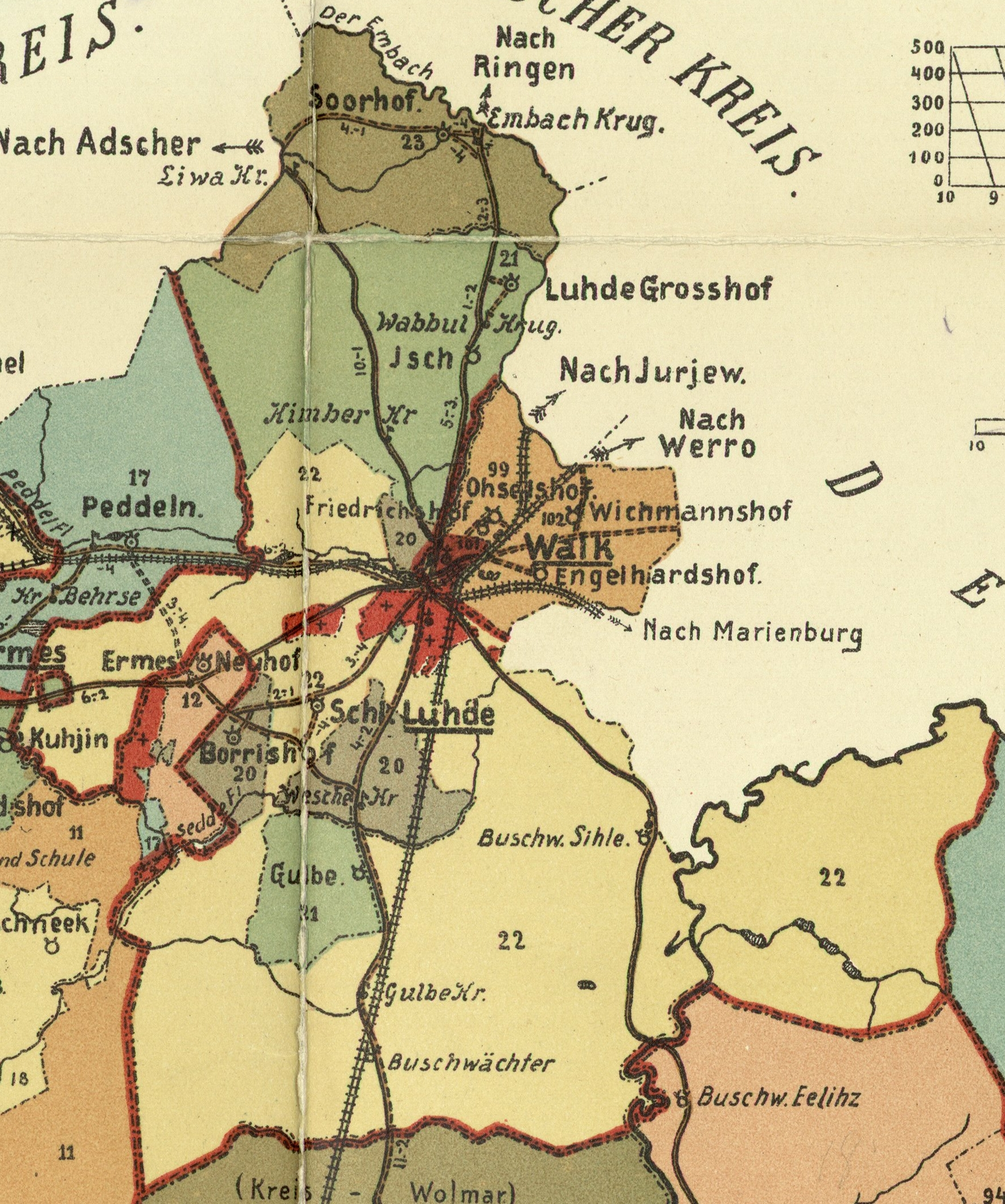 Luke kihelkonna mõisad 1904. aasta kaardil.